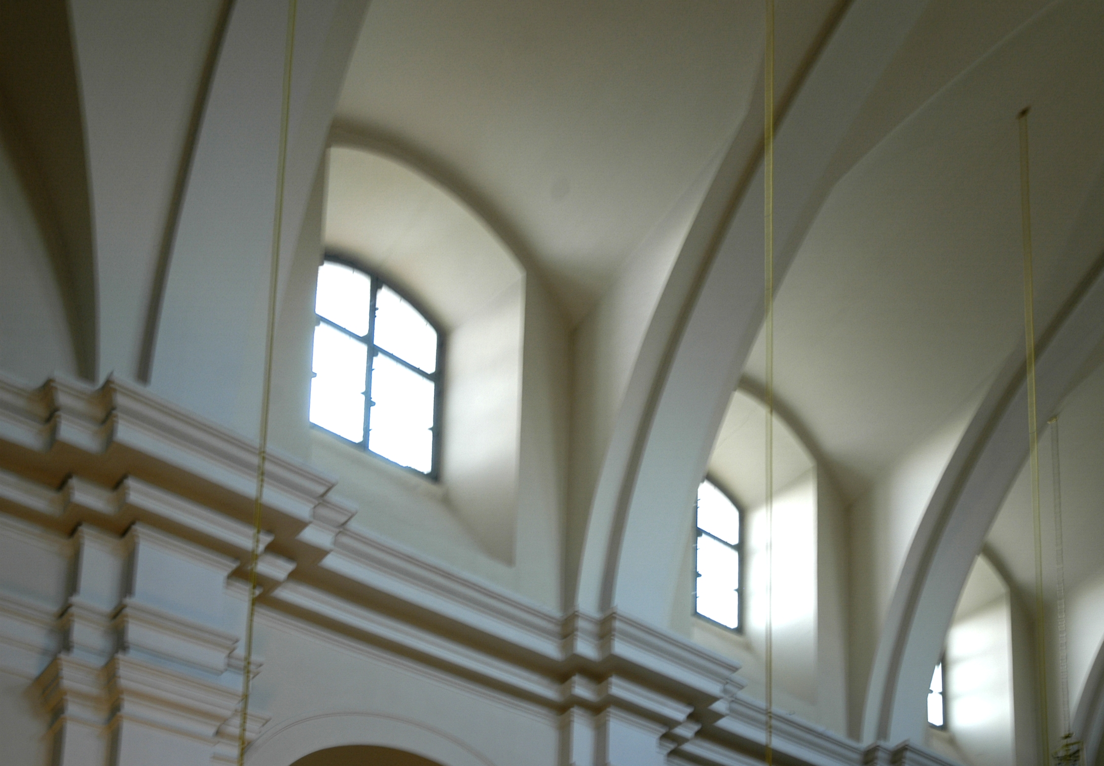 Einblick in das Gewölbe des Langhauses der katholischen Pfarrkirche Mariae Himmelfahrt in Ravelsbach